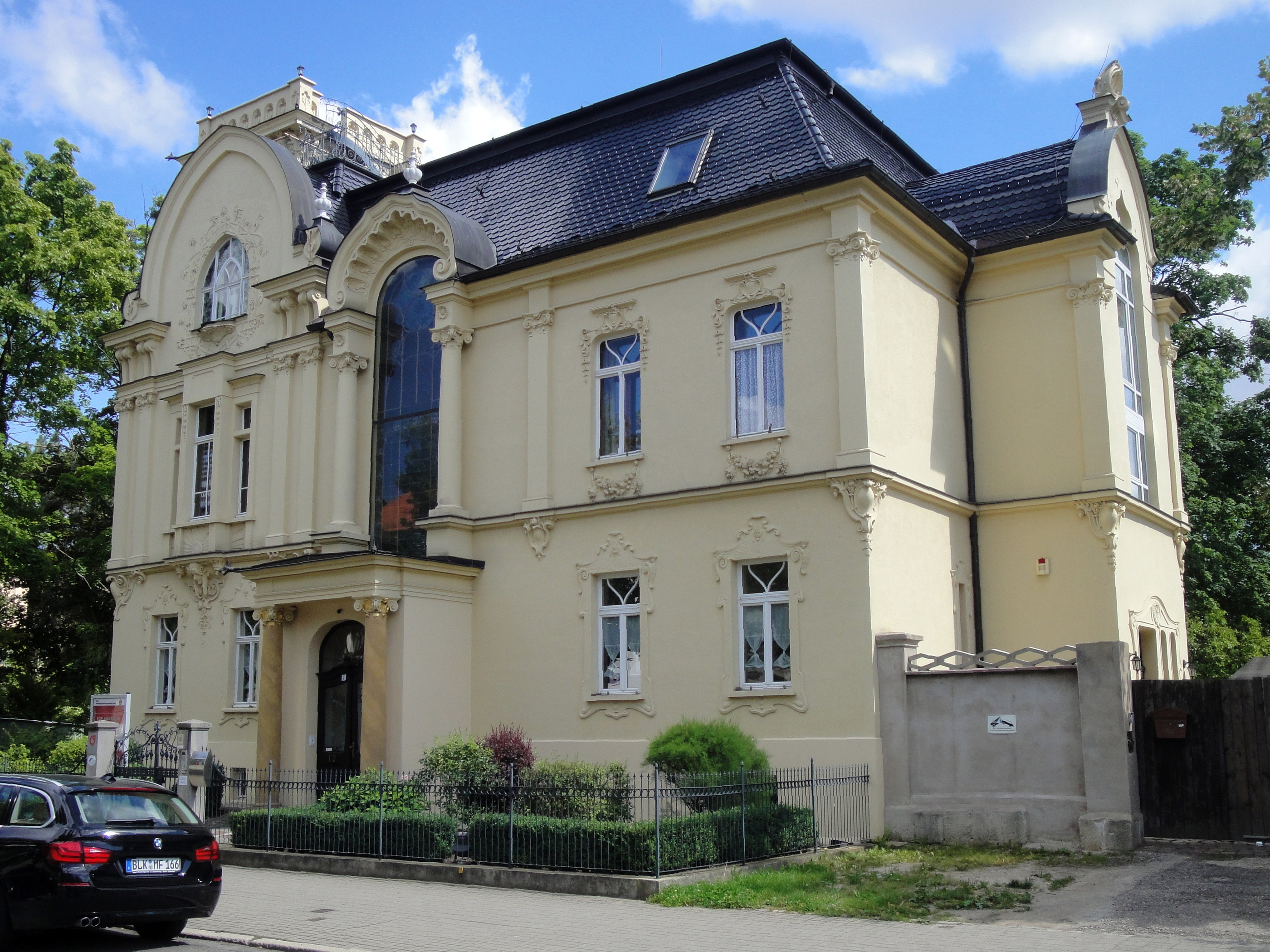 Villa, Naumburg (Saale)